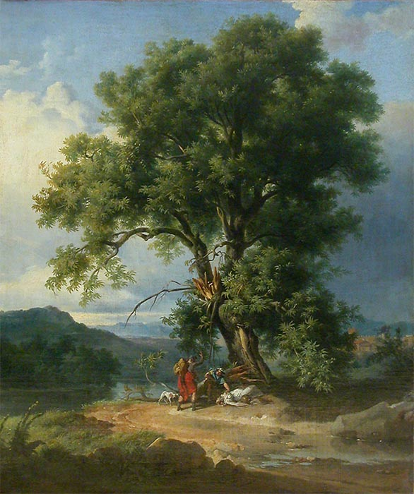 La femme foudroyée par Achille Etna Michallon (1796-1822), 105x81cm, Musée du Louvre